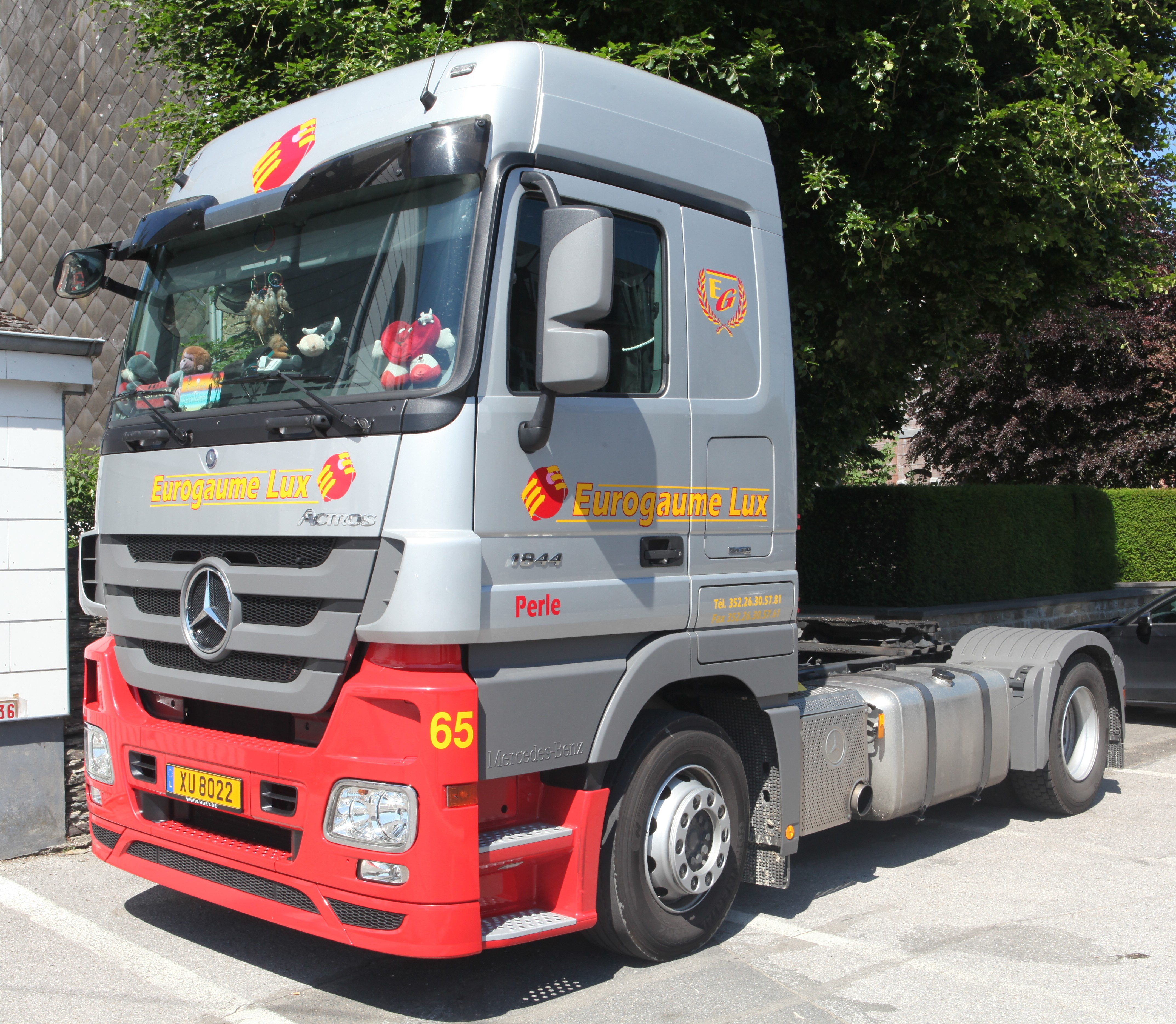 Mercedes-Benz Actros 1844 Eurogaume Lux